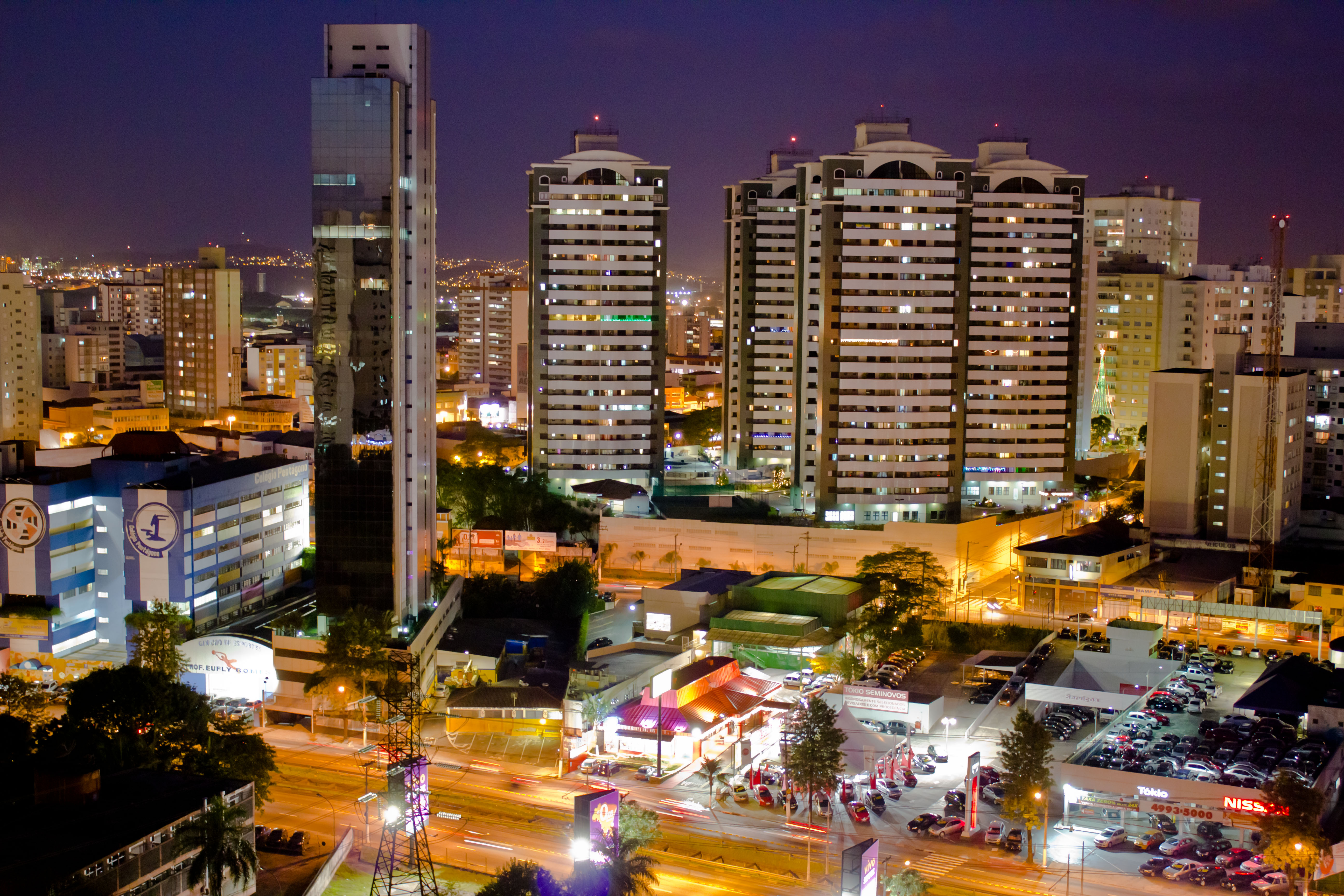 Santo André, São Paulo, Brasil.